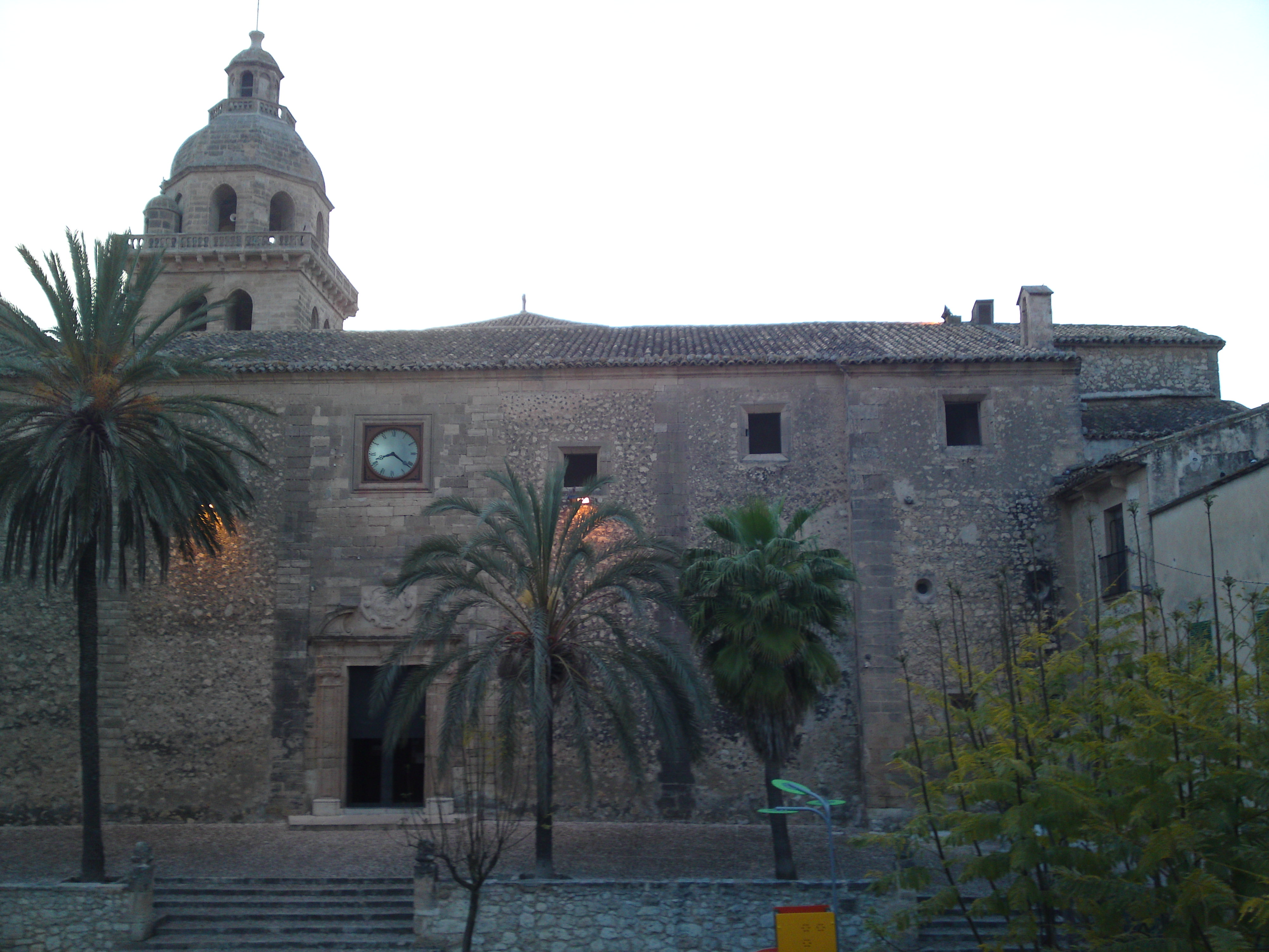 Façana de l'església de Sant Bartomeu de Montuïri i l'escalinata anomenada els Graons